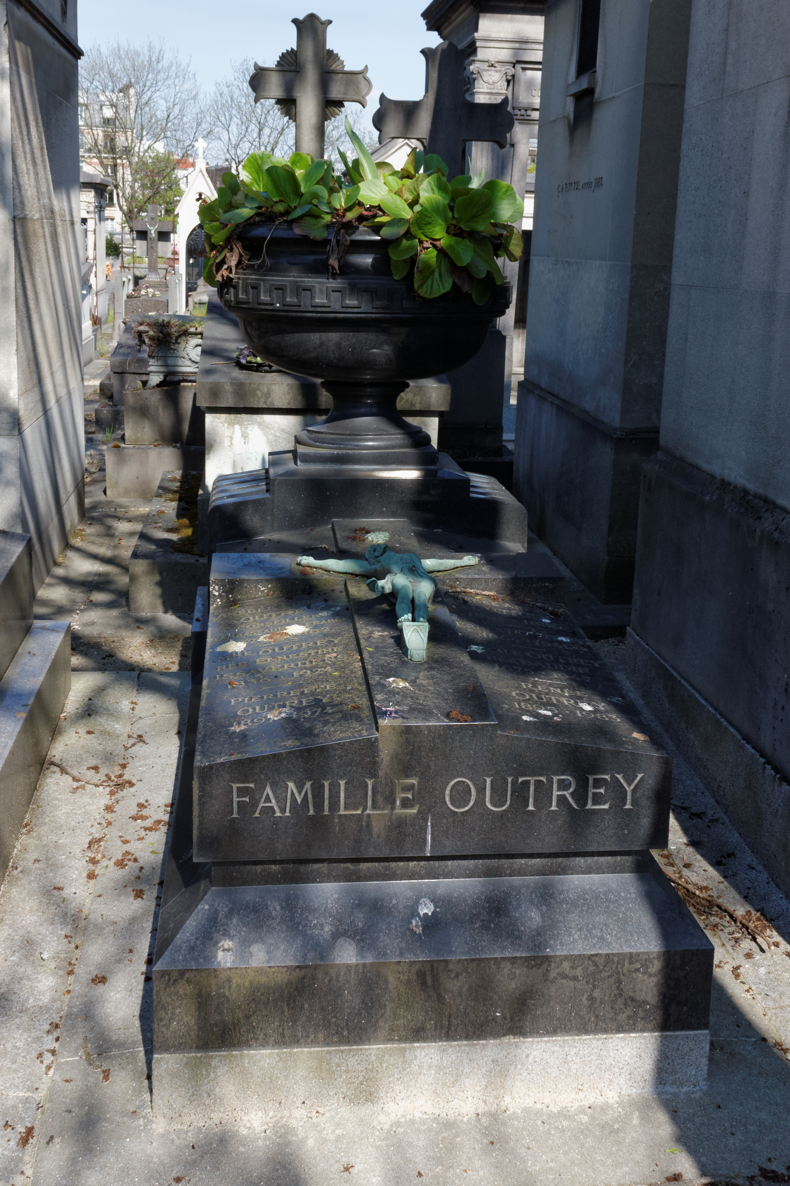 Vue d'ensemble